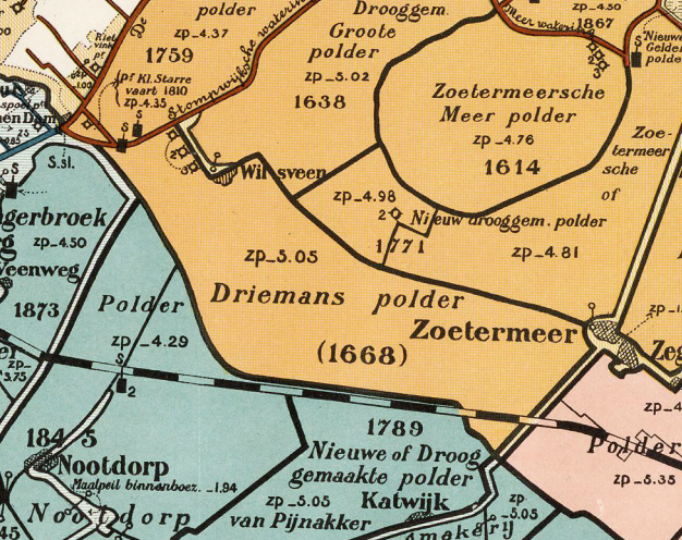 Driemanspolder